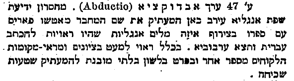 קטע ממאמר הביקורת ב"הצפירה"